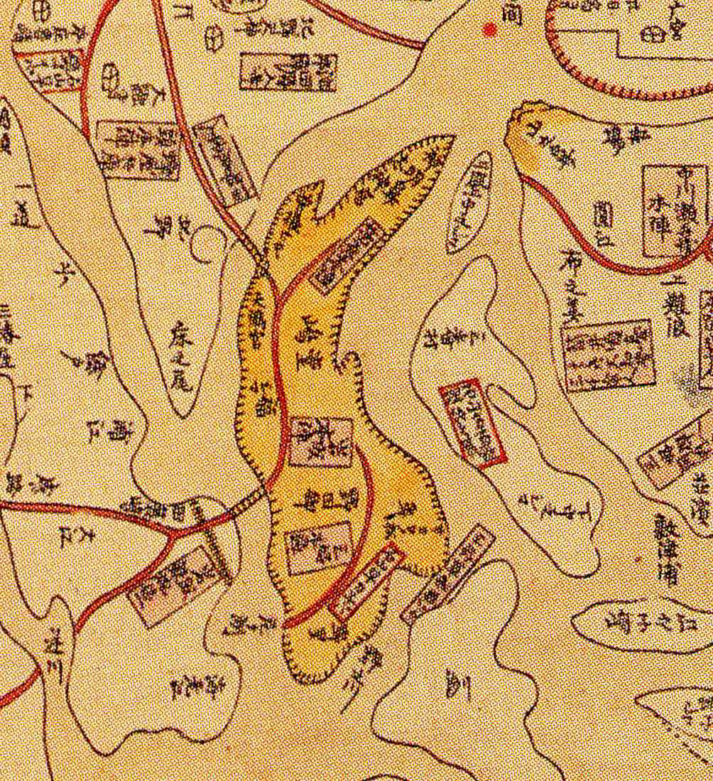 石山本願寺合戦図